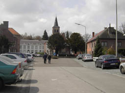 dorp van leeuwergem